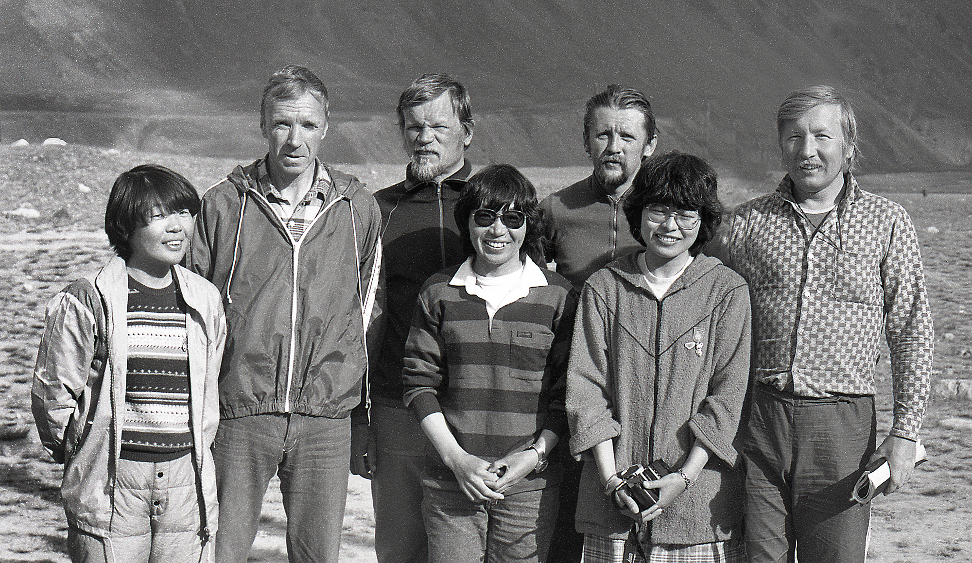 Nobuko Yanagisawa, Ilmar Priimets, Jaan Künnap, Junko Tabei, Alfred Lõhmus, Mayuri Yasuhara ja Kalev Muru. 1985